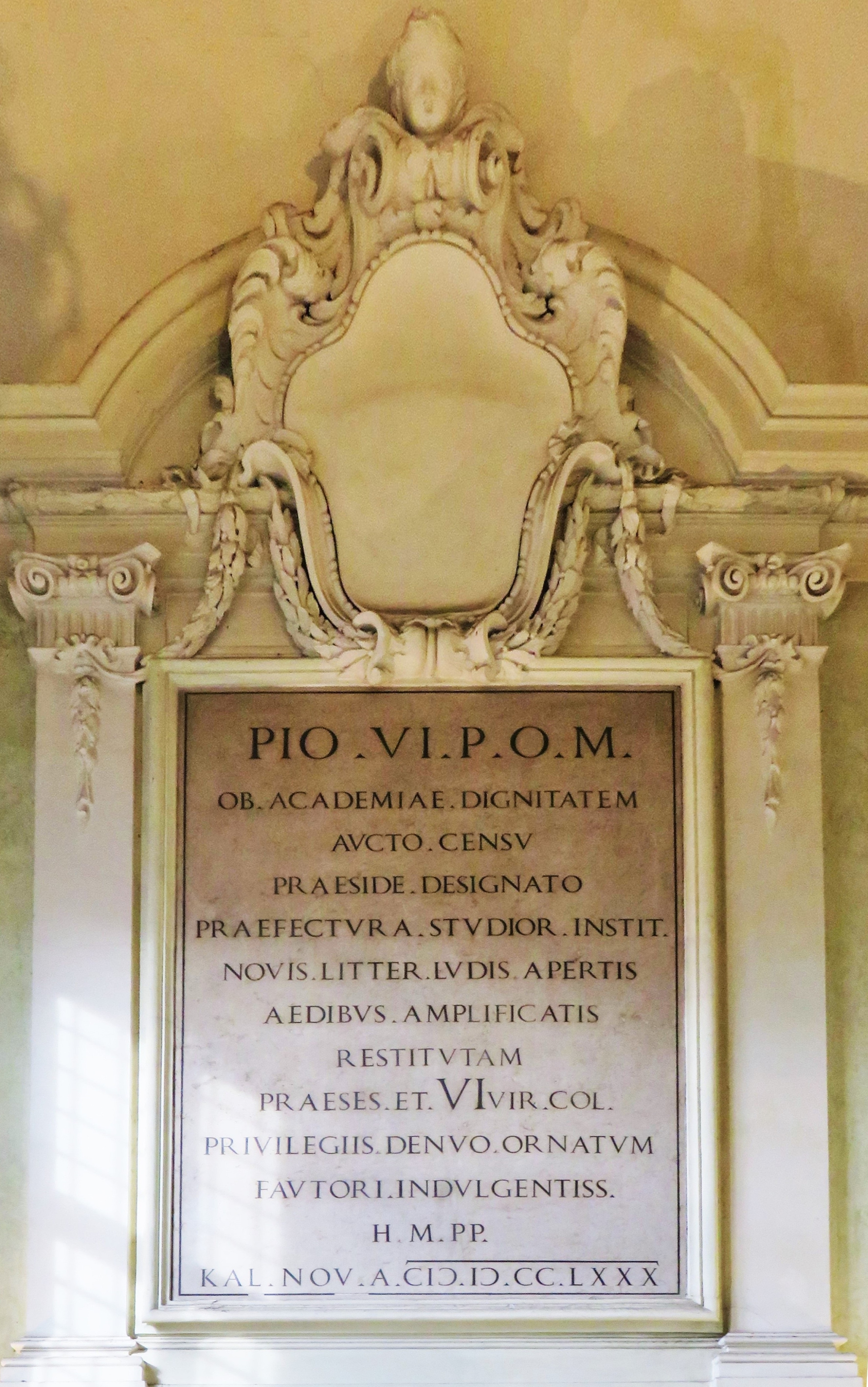 Giovanni Angelico Braschi, futuro papa Pio VI , completò i suoi studi di giurisprudenza all’Università di Ferrara. Una targa, posta nello scalone d'onore dell'allora sede dell'ateneo, palazzo Paradiso, lo ricorda